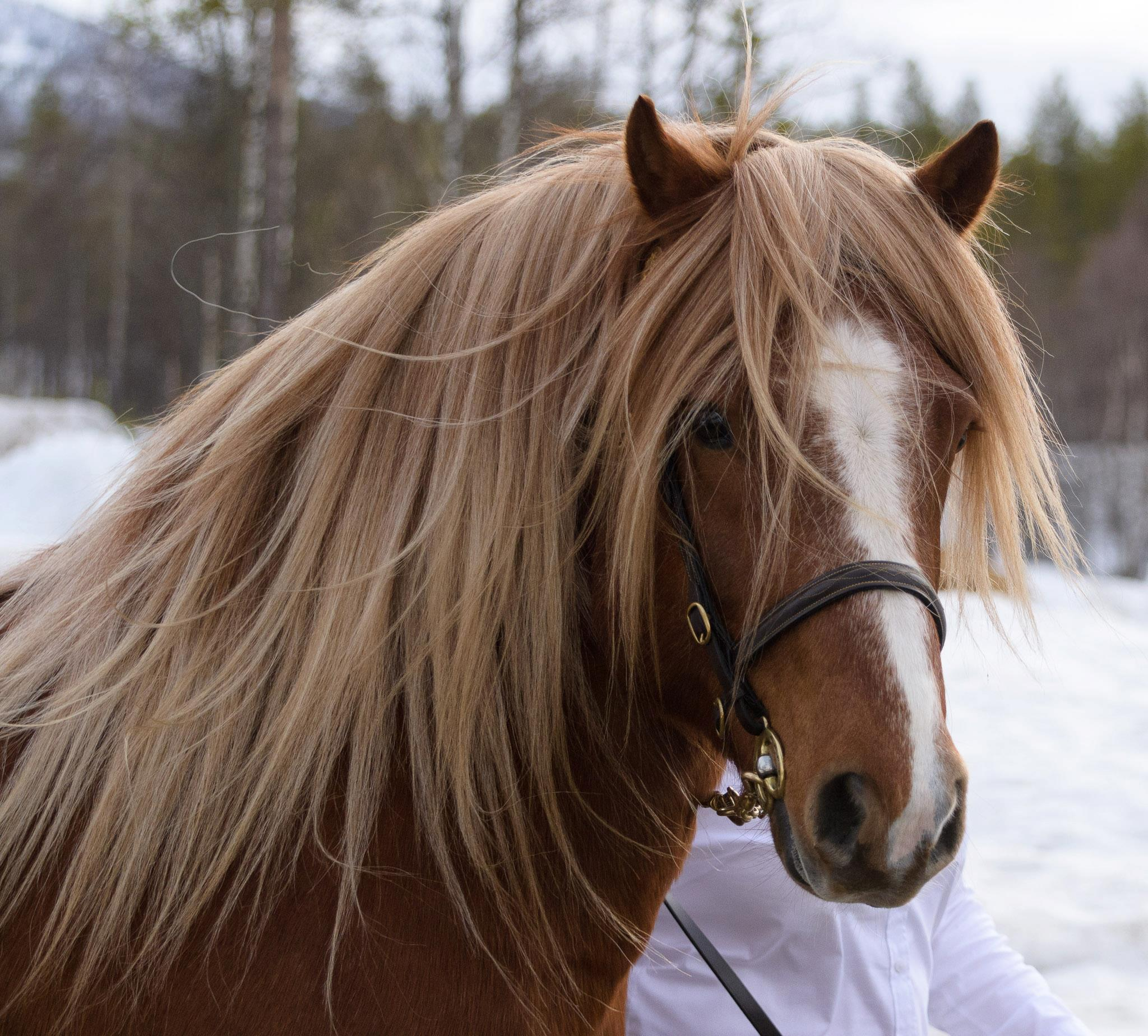 Portrett - Jektviks Bragd, 1. premiert hingst